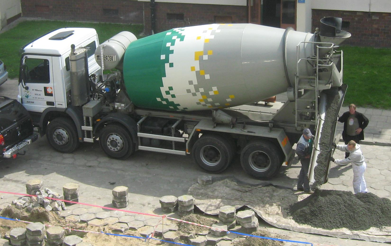 Betoniarka nie służy wyłącznie do mieszania gotowej zaprawy, ale też suchych składników